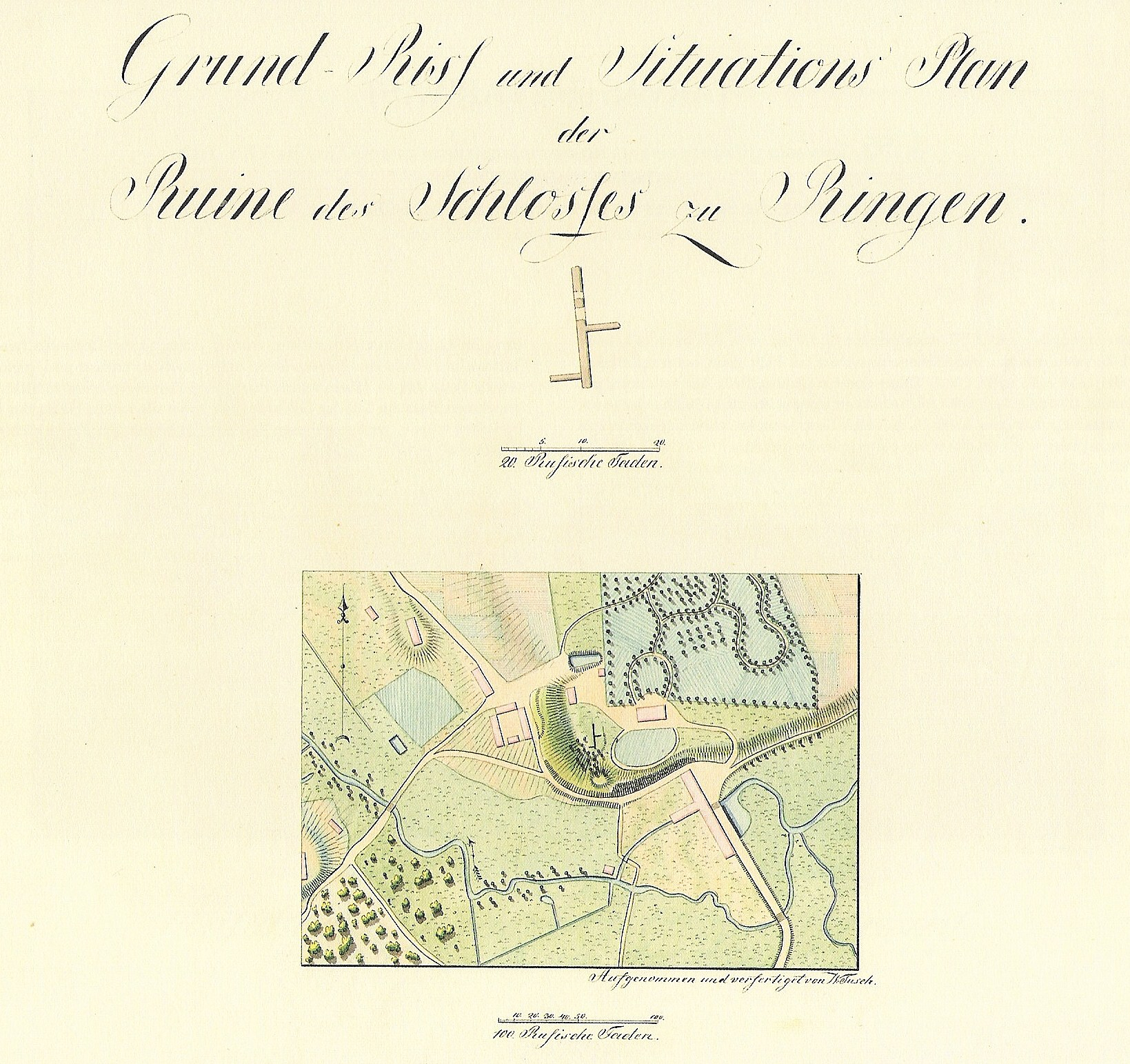 Rõngu linnuse asendiplaan